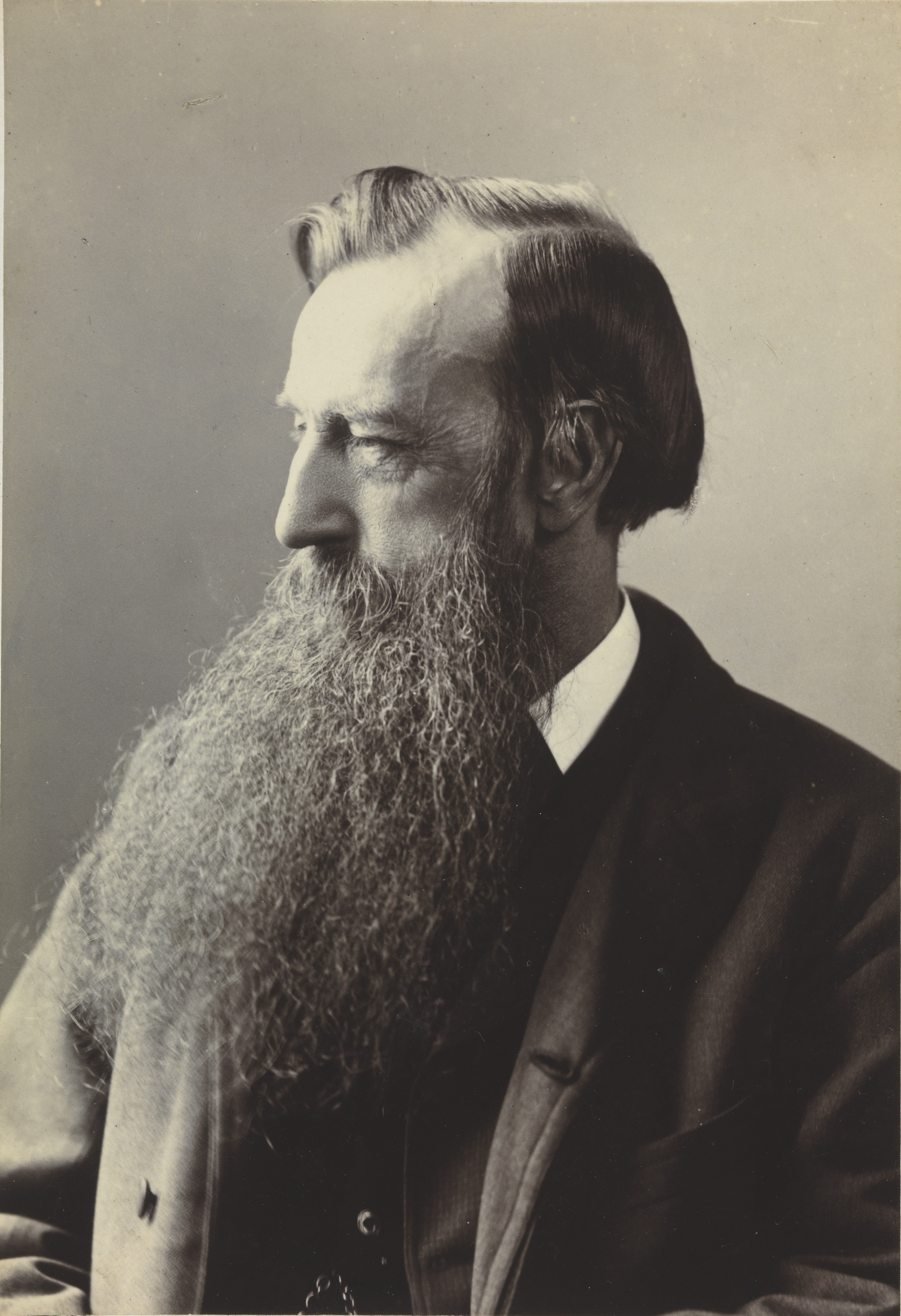 Alexander Buchan. Depicted person: Buchan, Alexander Depicted place: Storbritannia, Edinburgh